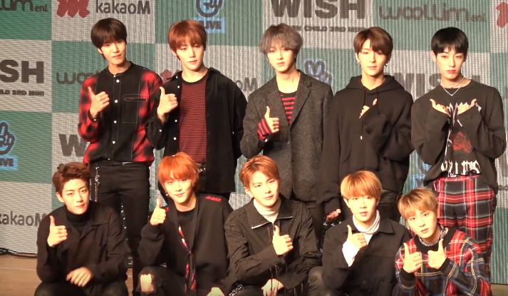 골든차일드(Golden Child) 3집 WISH 쇼케이스 포토타임